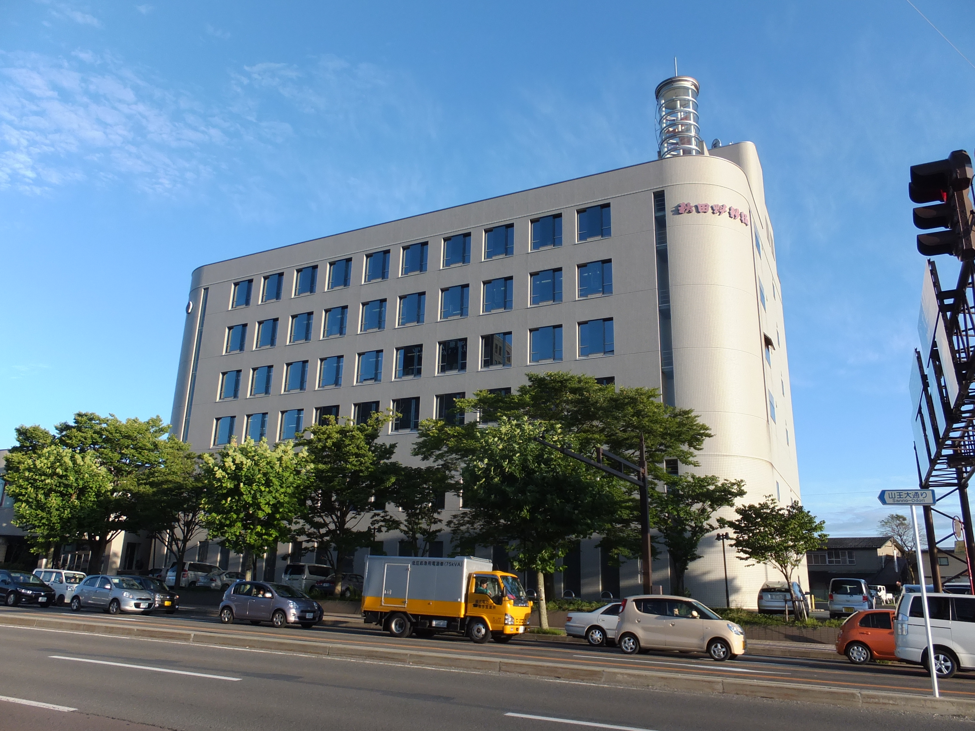 秋田魁新報 本社（秋田市山王臨海町）